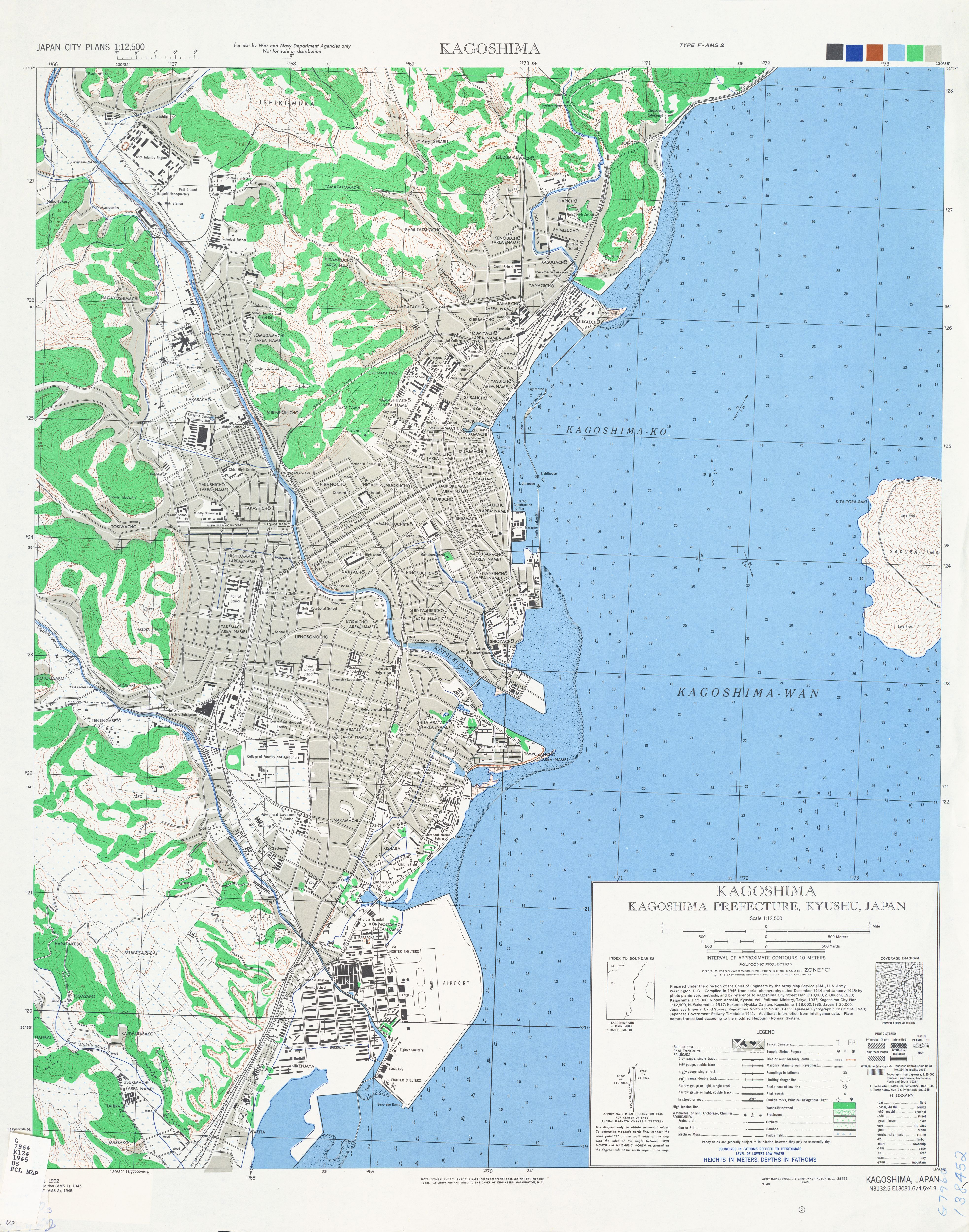 1946年ごろの鹿児島市の地図